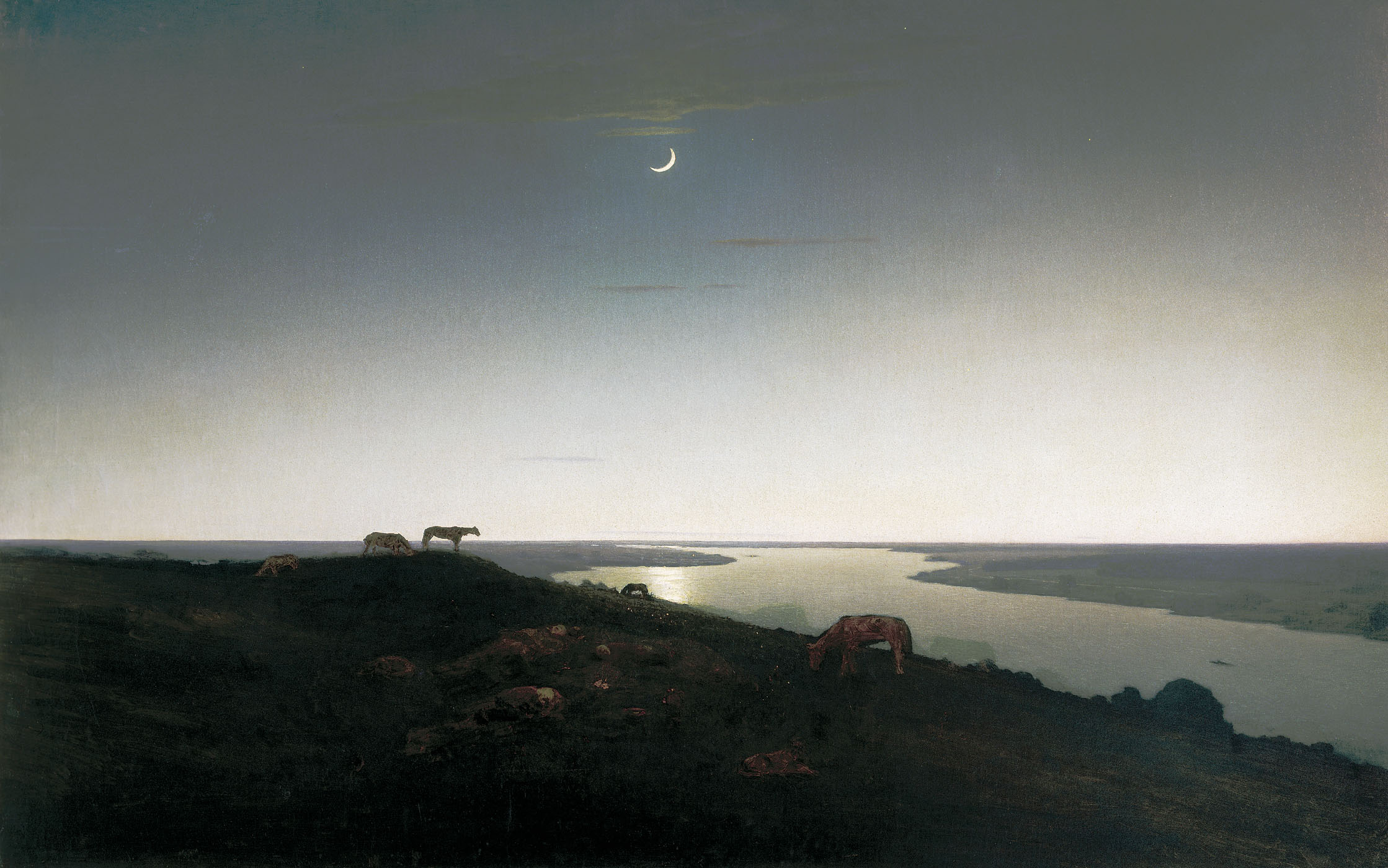 А. И. Куинджи. Ночное. 1905—1908. Холст, масло. 107 × 169 см. Ж-4196. Русский музей, Санкт-Петербург, Россия.